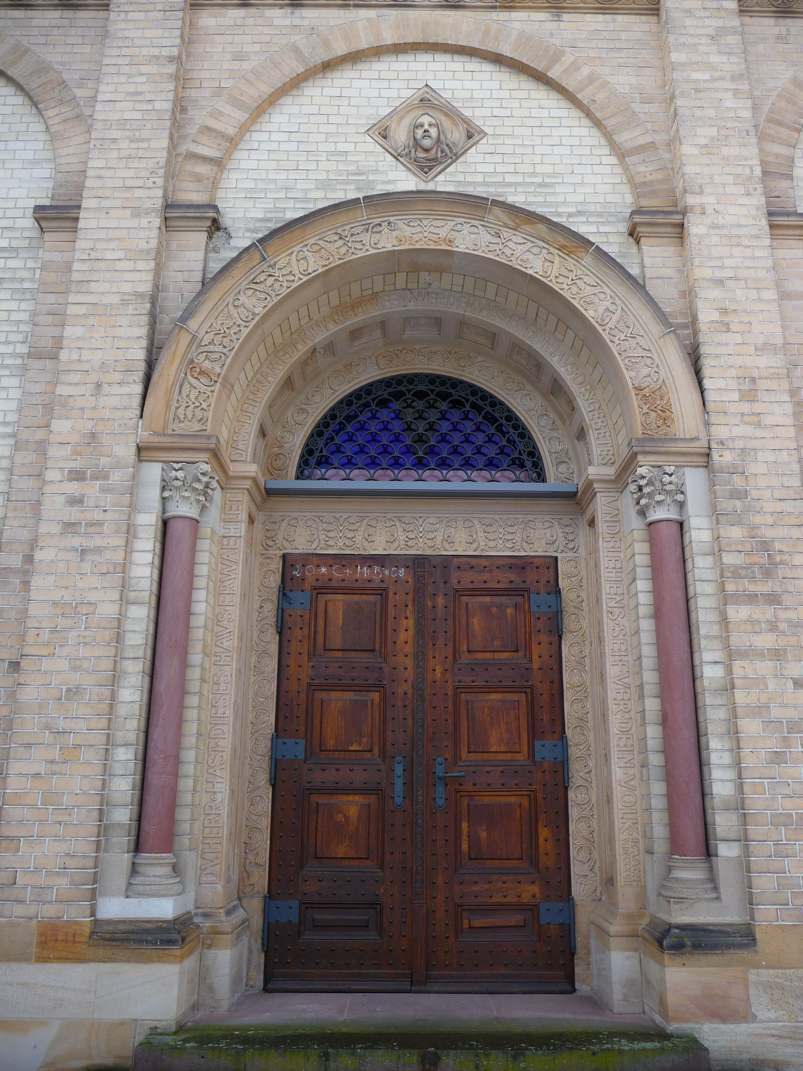 Hauptportal der katholischen Kirche St. Raphael in Heidelberg-Neuenheim (Deutschland)